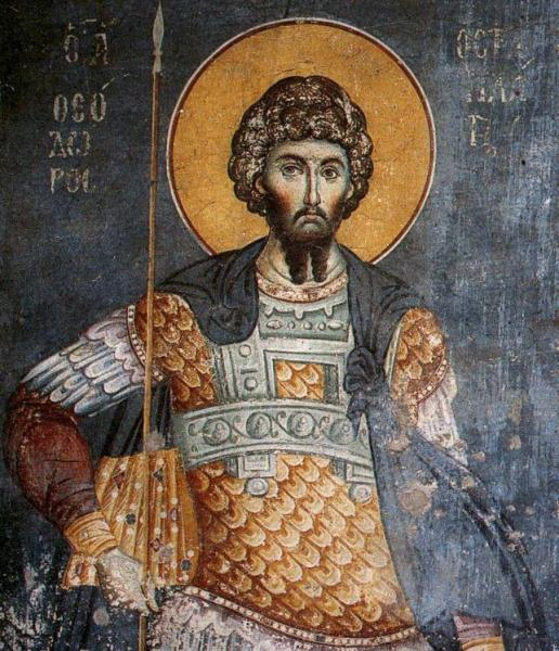 sv. Teodor Stratilat